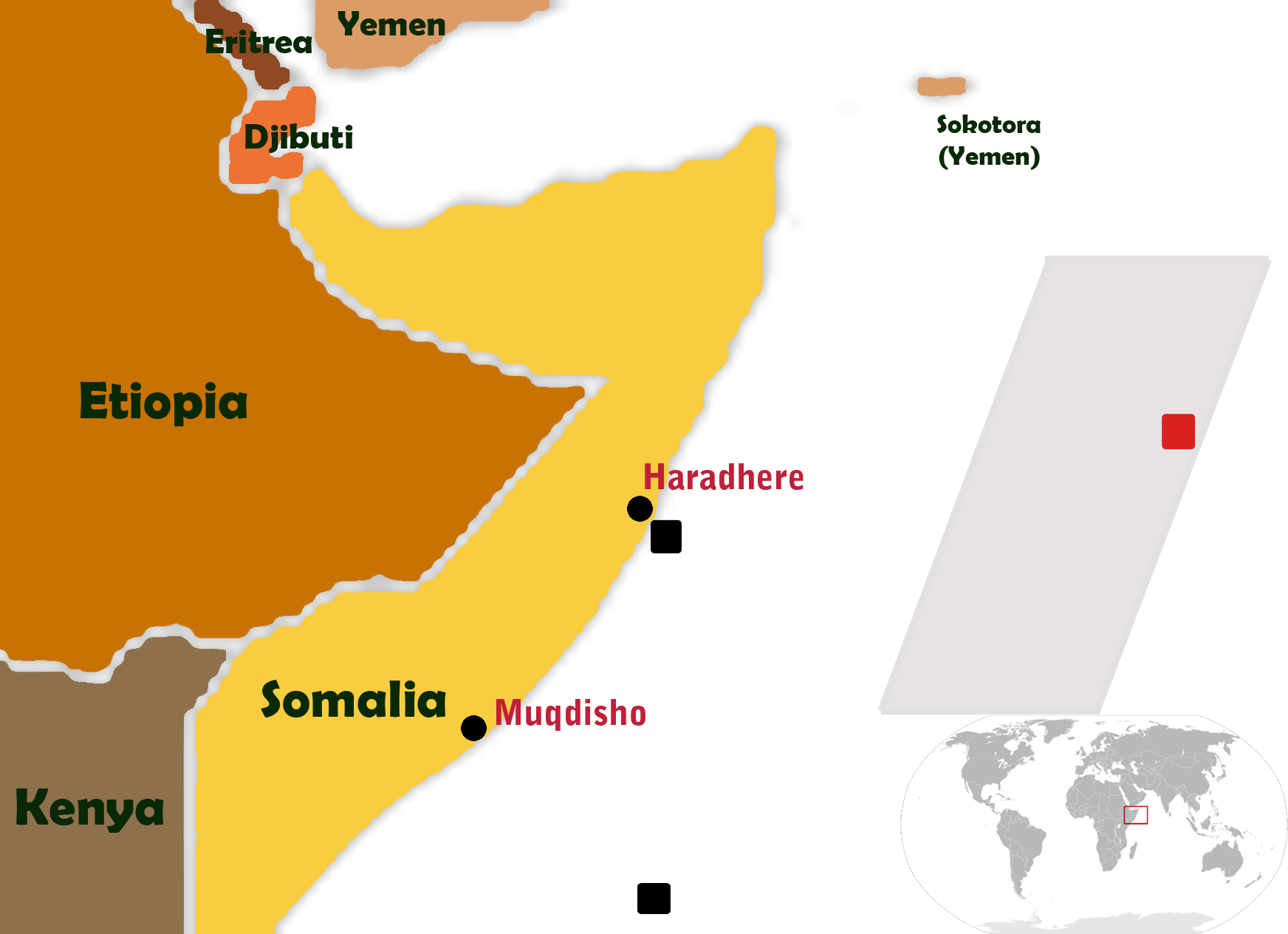 Alakranaren bahiketa azaltzen duen mapa.